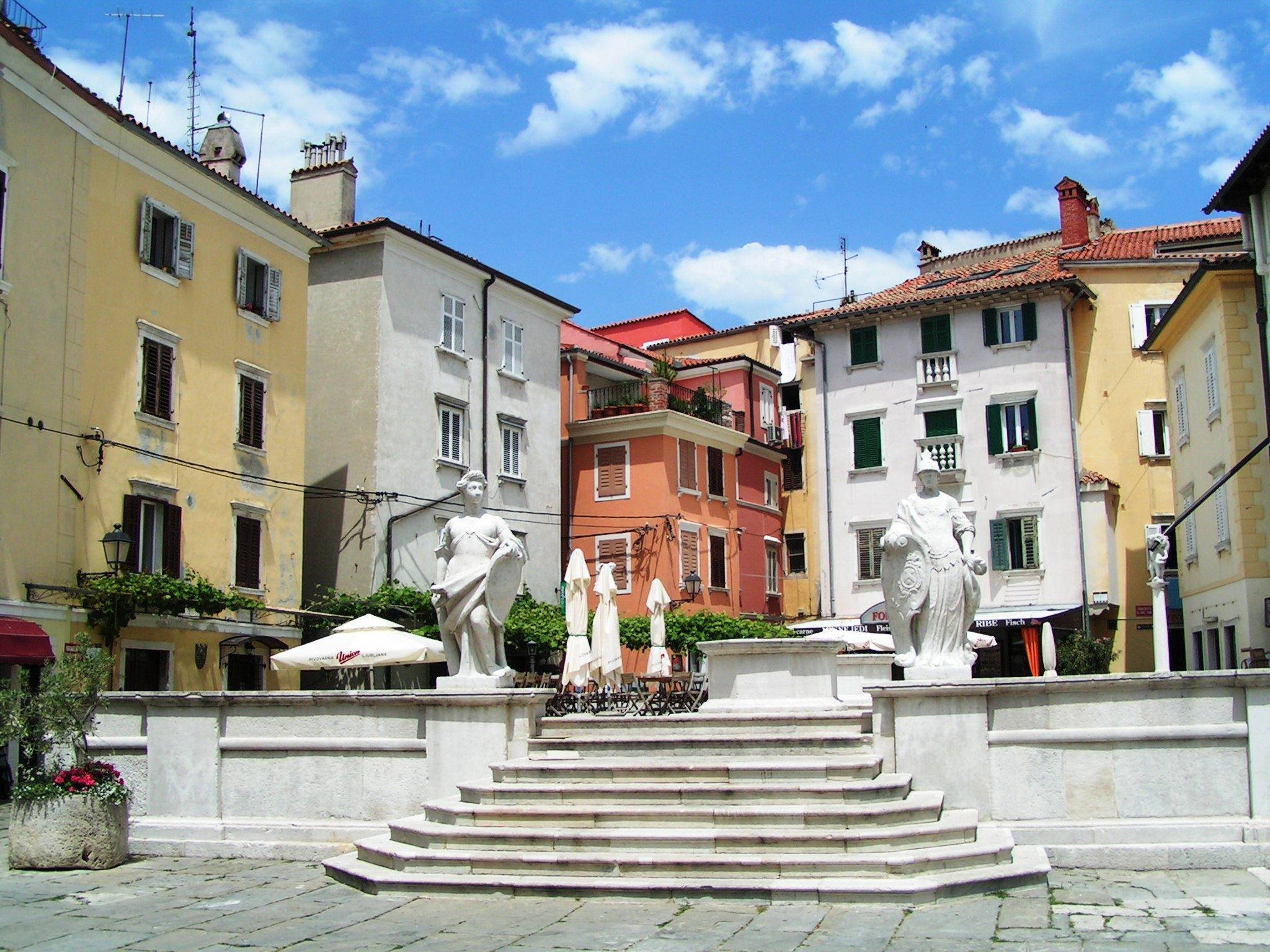 Piran, Slowenien